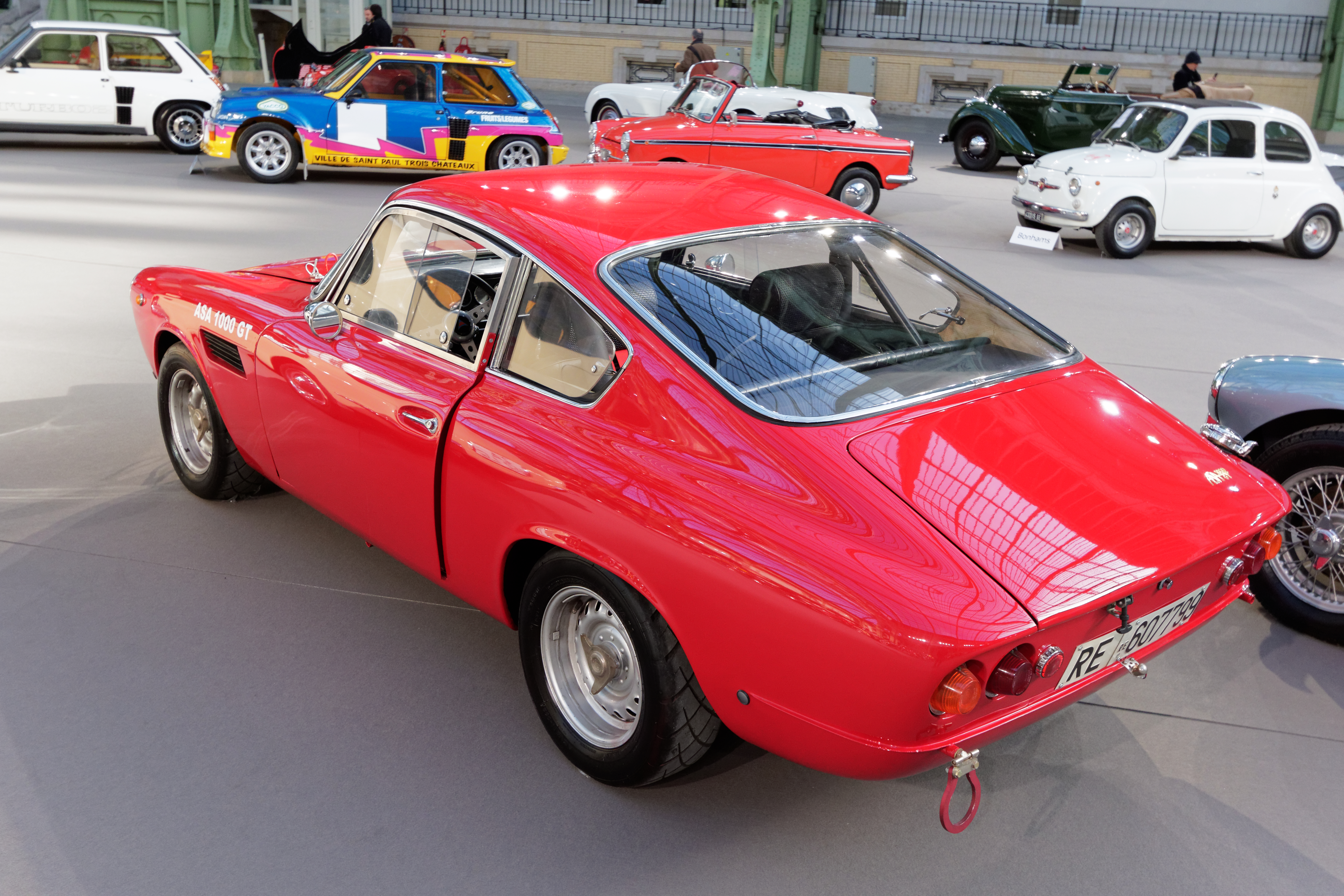 Un des véhicules présenté lors de la vente aux enchères Bonhams 2015 au Grand Palais de Paris.